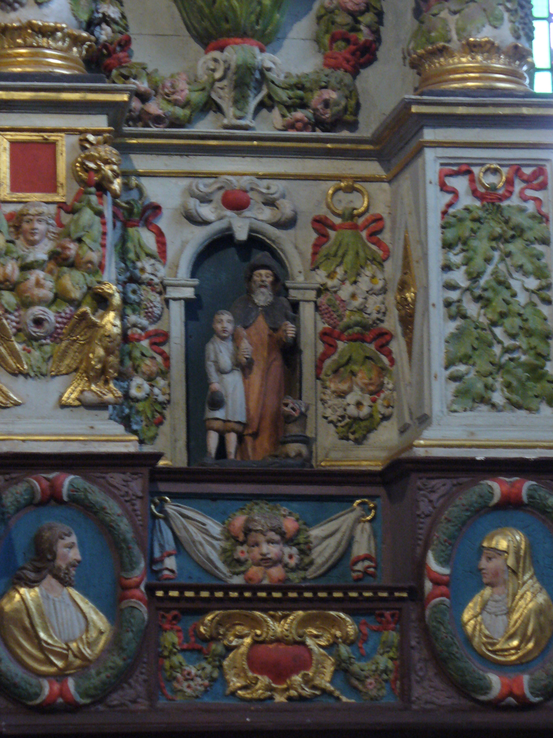 Altar- Der bretonische Heilige St.Herbot-Saint Hervé, Wolf und der kleine Führer-Kirche Eglise Saint Miliau-Guimiliau-Enclos Paroissal-Umfriedeter Pfarrbezirk